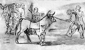 Recorte del toro de cuerda del mural de azulejos pintados sobre Beas